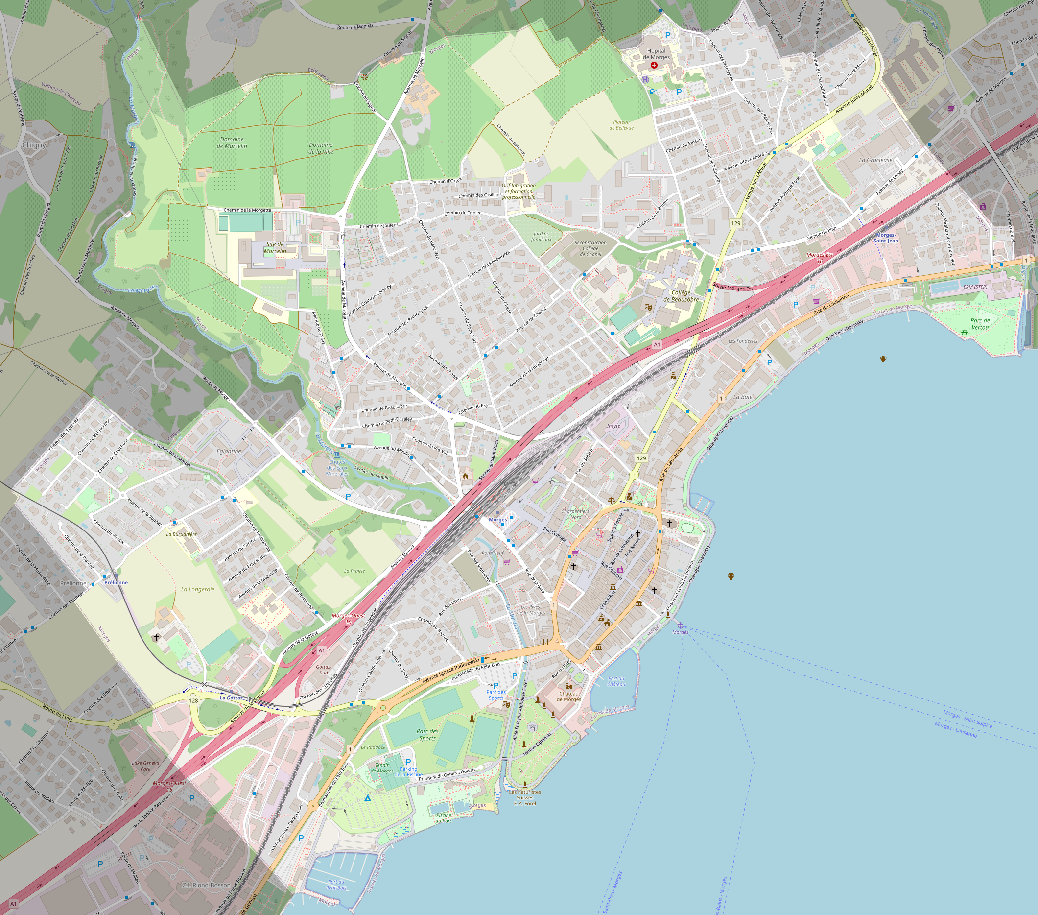 Carte de la commune de Morges, cadrée selon les limites de la commune. échelle 1:2'500